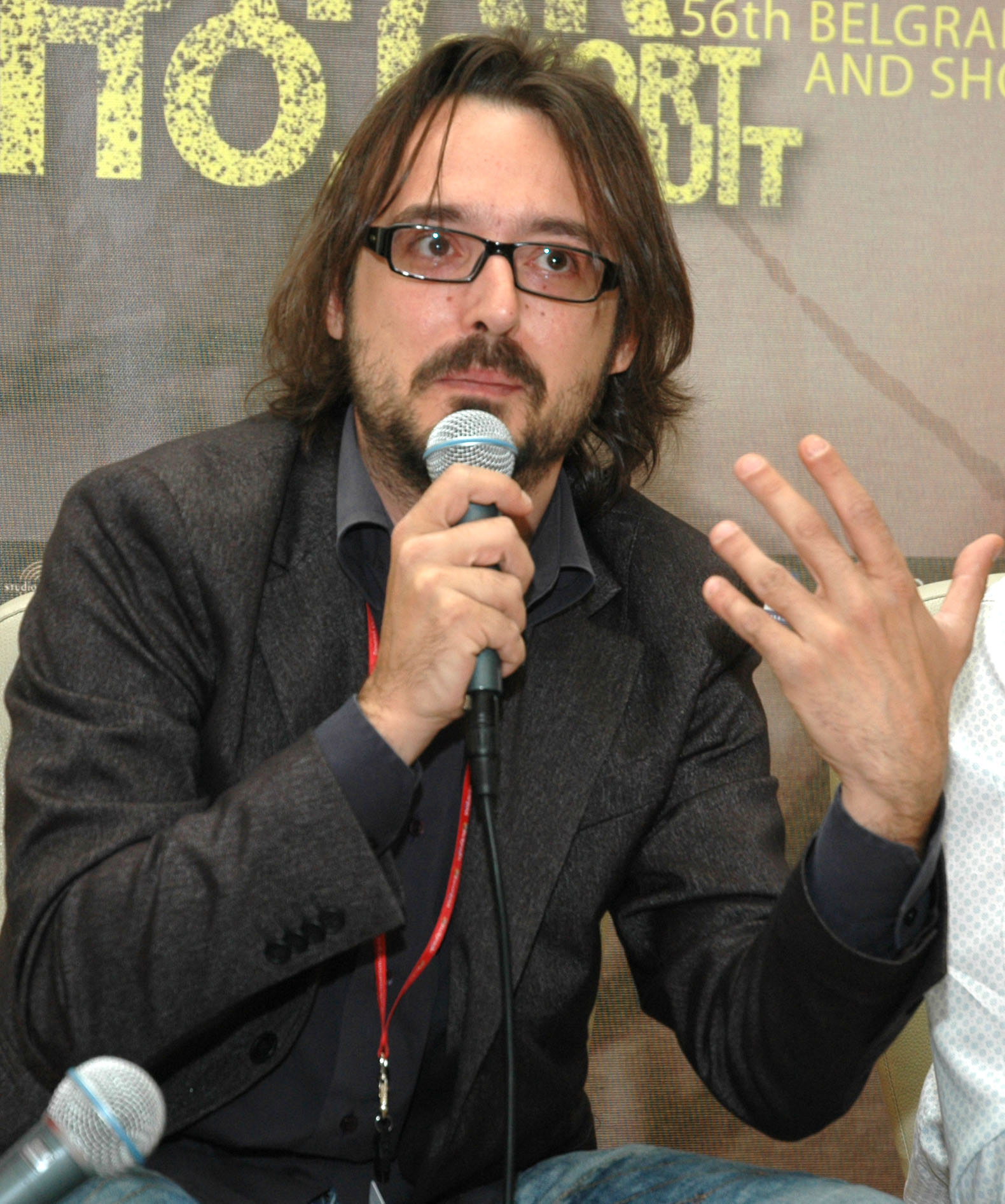 Belgrado 2009